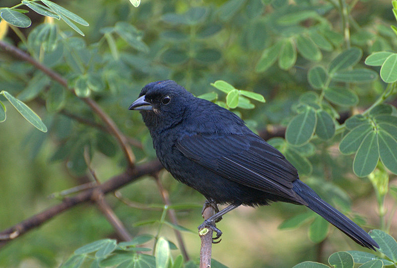 No quintal da casa dos meus pais na cidade de Piraju-SP